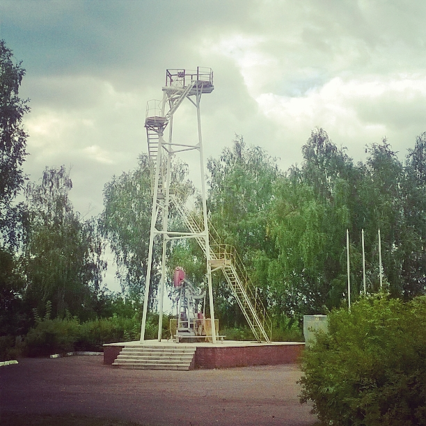 Вышка Бабушка - первооткрывательница башкирской нефти в Ишимбае